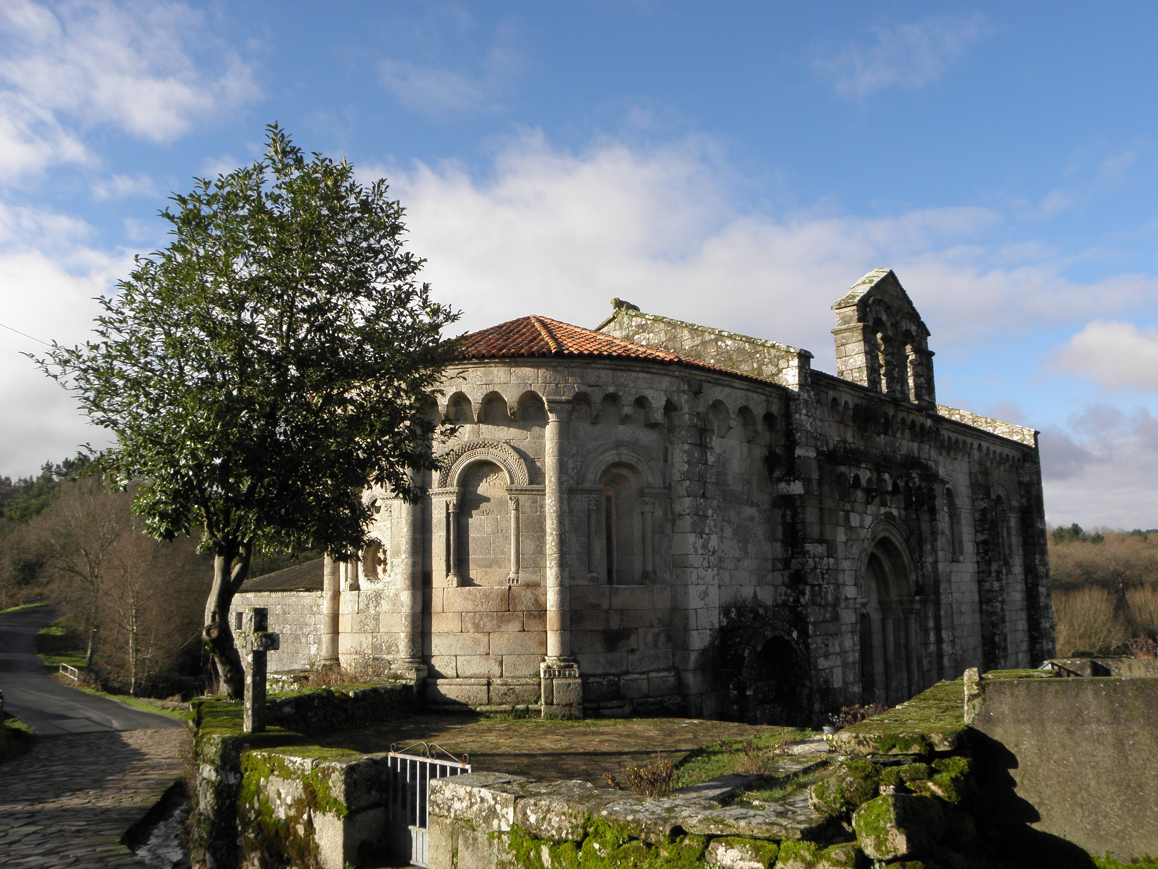 Esta igrexa edificouse no ano 1154. Formaba parte dun antigo cenobio de monxas benitas. É de planta rectangular, cos muros de cadeirado granítico disposto en fiadas horizontais. Destacan a ábsida semicircular con ventás nos tramos que forman columnas pegadas e tellados de arcos. A fachada e o muro norte teñen portada con arquivoltas e columnas, sendo neste onde se sitúa unha espadaña de dúas vans. Dozón, Galiza